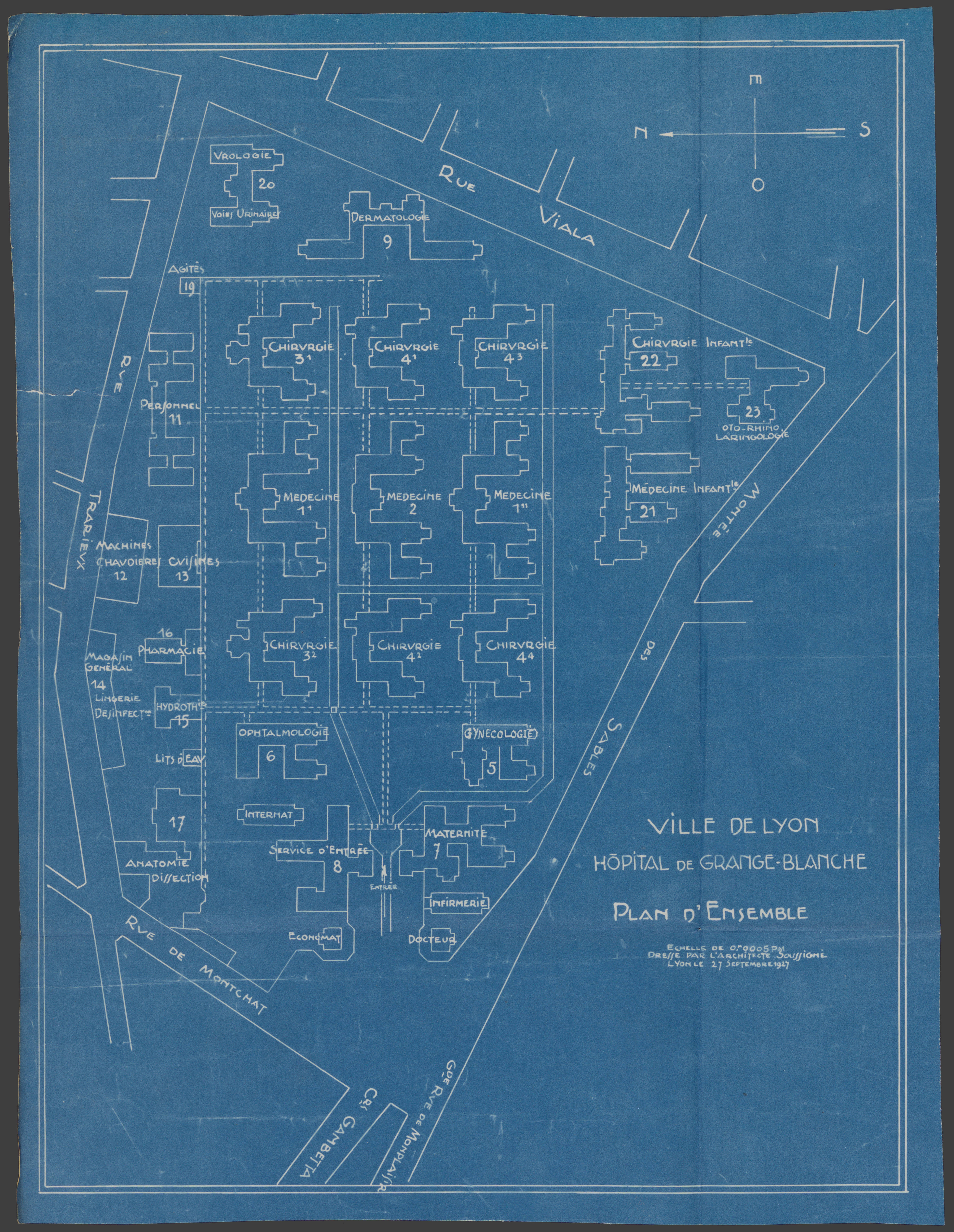 plan d'ensemble de l'Hôpital Edouard Herriot de Lyon (27 septembre 1927). cote aux archives municipales de Lyon 484WP 22.